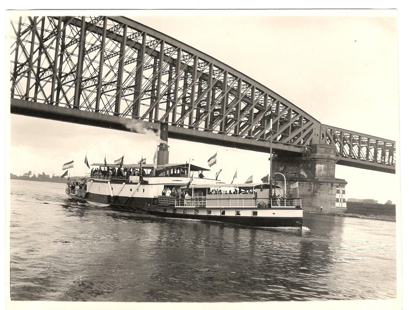 De Reederij op de Lek 5